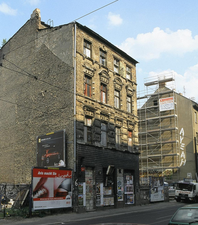 Es stand einmal und ist nicht mehr - oder erst recht: alles IM EIMER